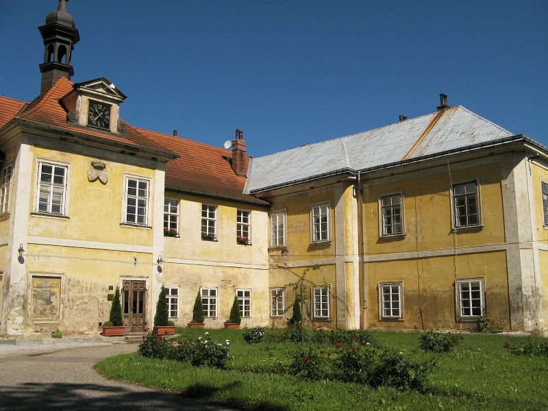 Zámek Vokšice, Vokšice 1